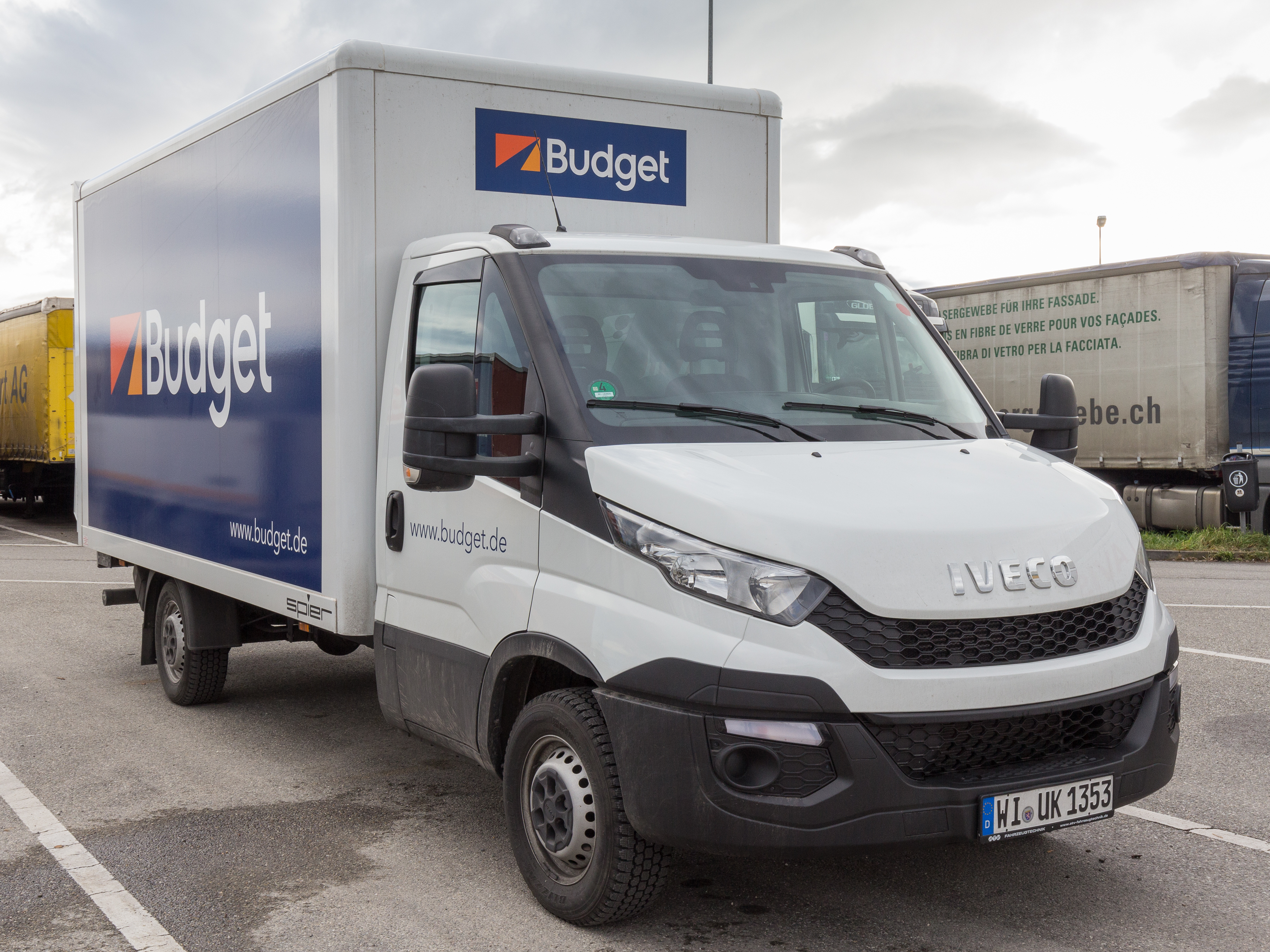 Iveco Daily 35-150 der 6. Generation mit Kastenaufbau